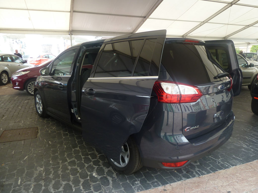 Ford España